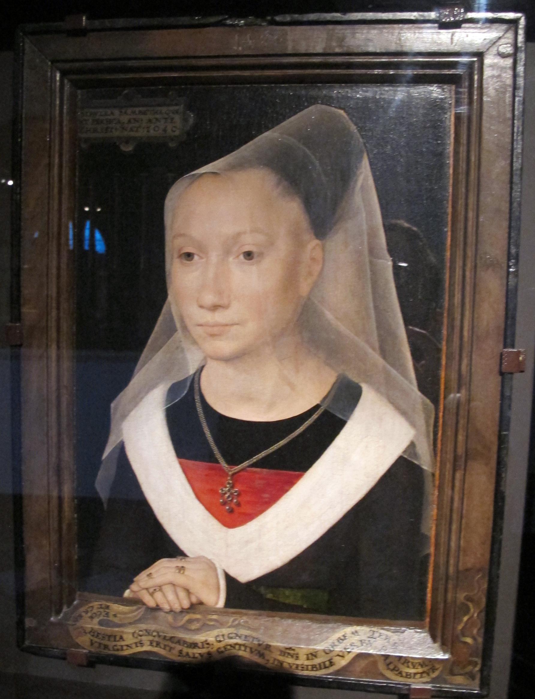 Hans memling, sibylla sambetha, 1480